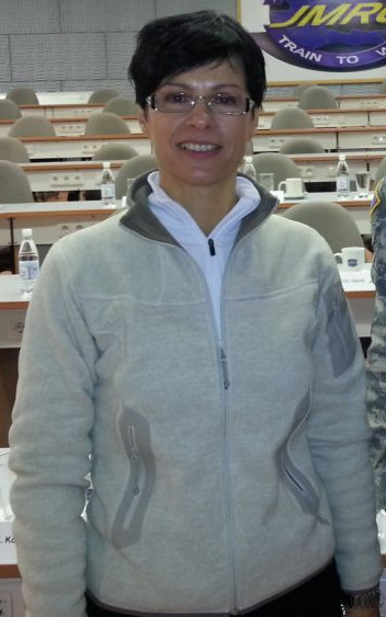 Marta Kos Marko